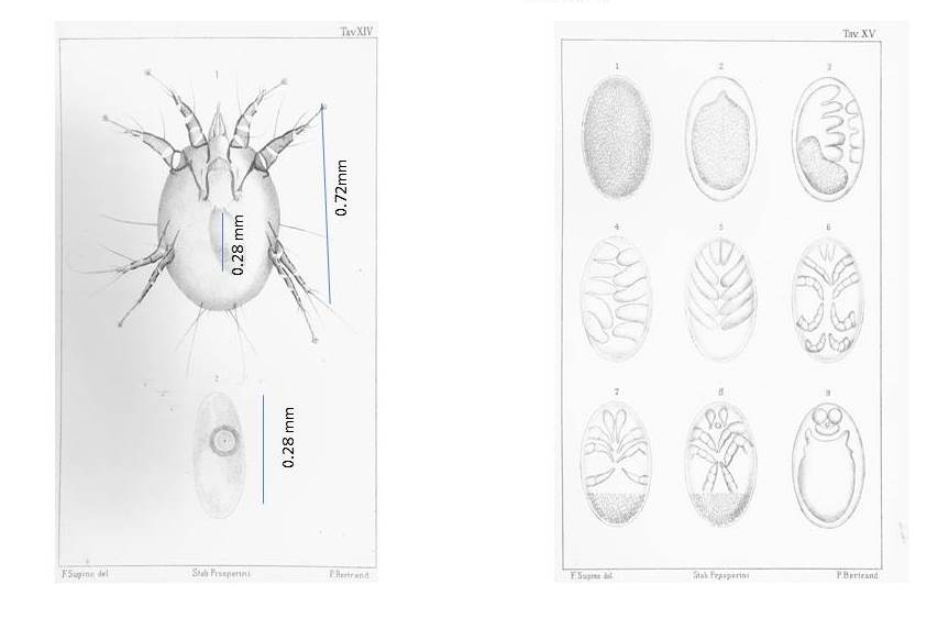 sviluppo degli acari dall’uovo fino allo sviluppo dell’embrione con evidenza delle mandibole e delle 4 paia di arti con commenti sulla filogenesi di tali specie